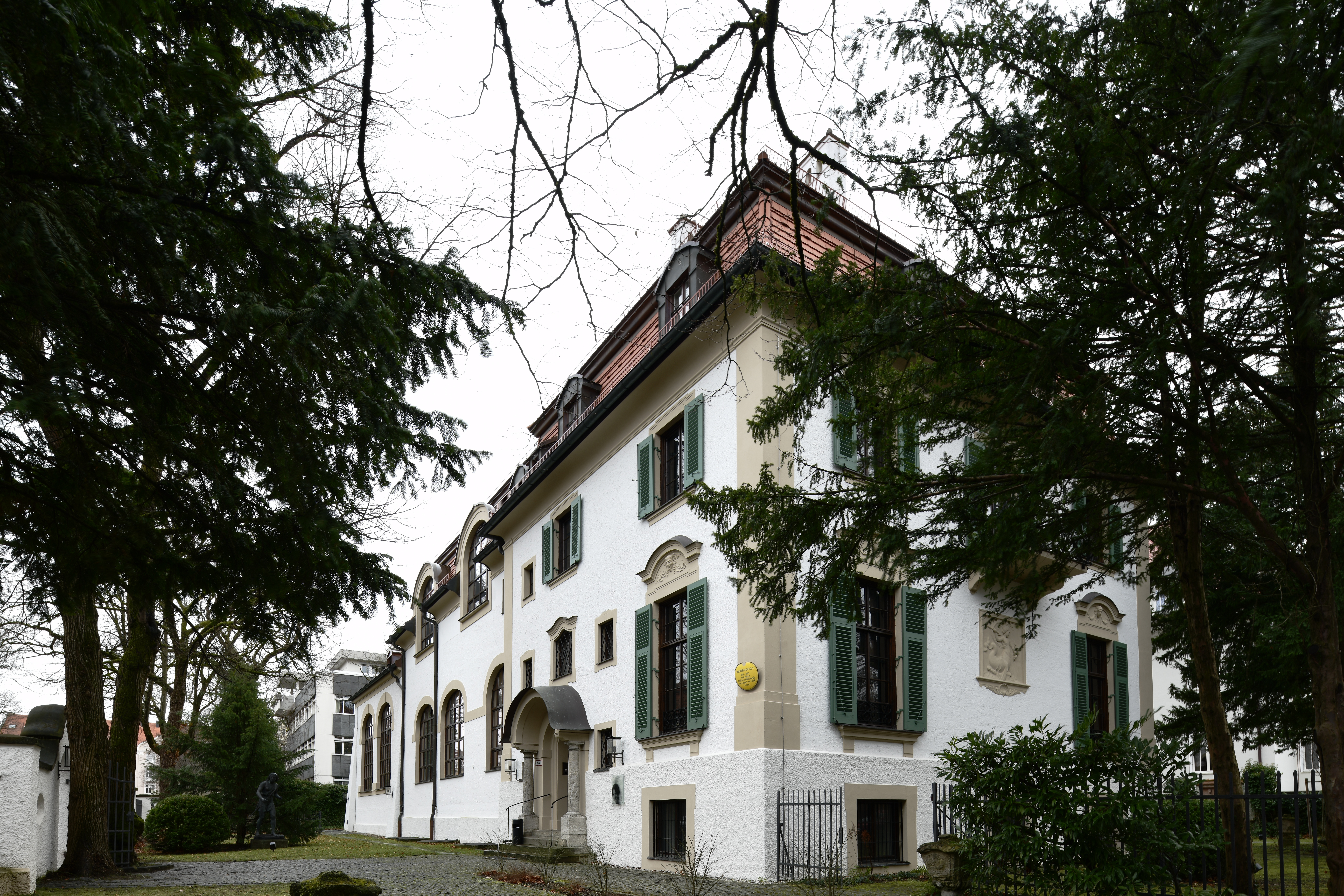 München, Fassadenansicht der Maria-Theresia-Straße 23, innerhlab des Grundstücks. Ehedem Hildebrandhaus. Zustand Januar 2018.